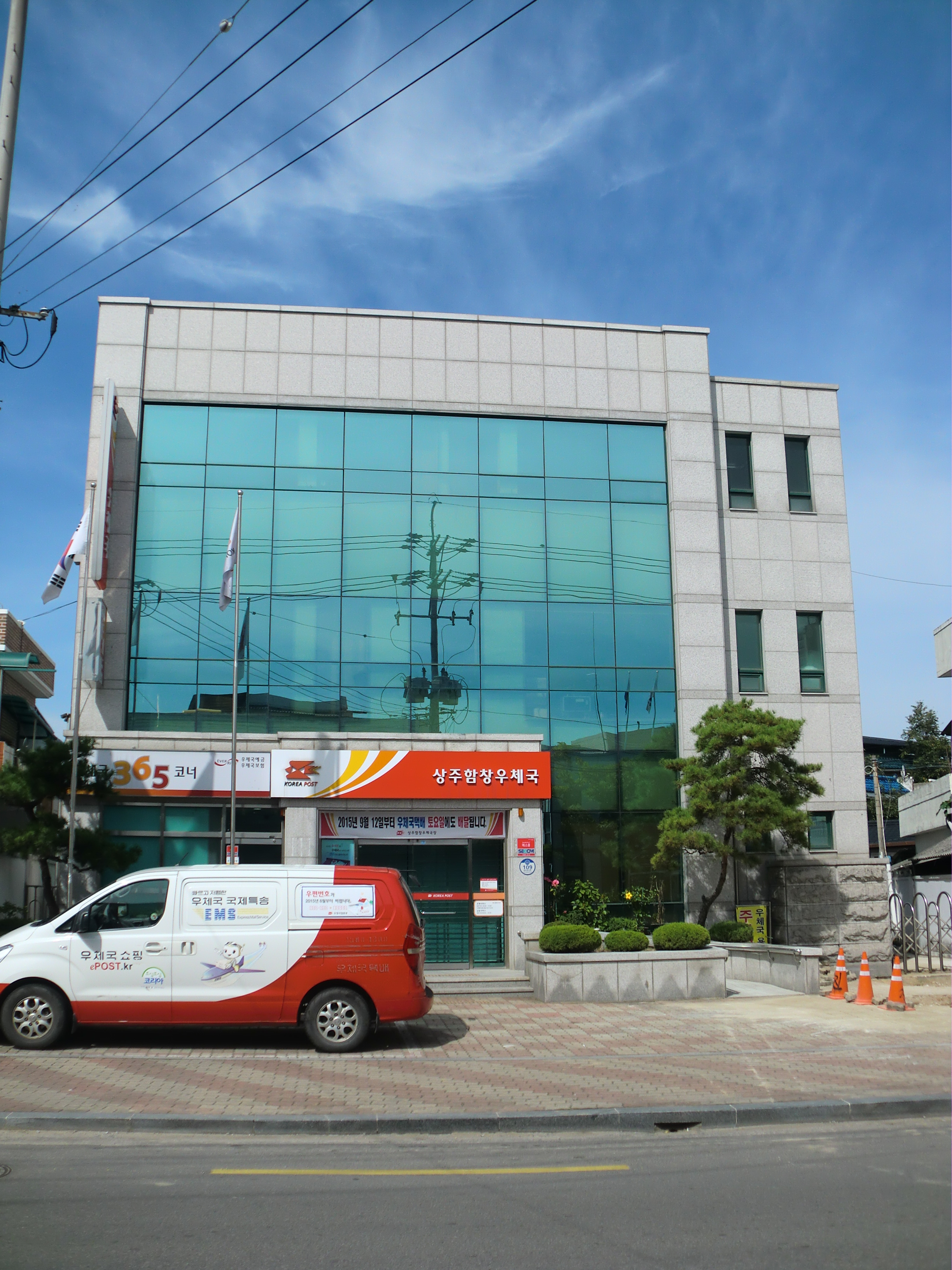 경상북도 상주시에 있는 함창우체국